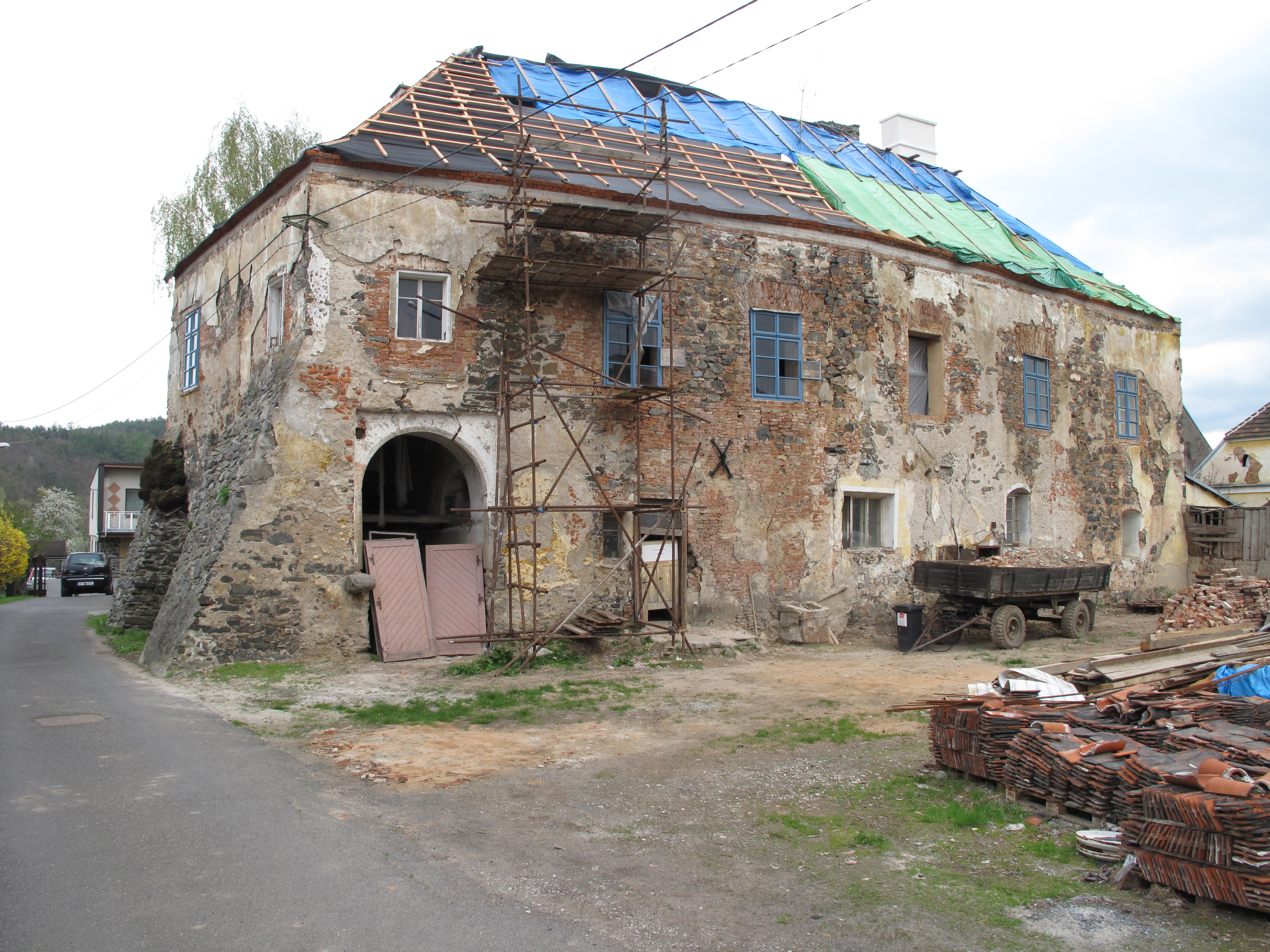 Dolany (okres Klatovy). Okres Klatovy, Česká republika.